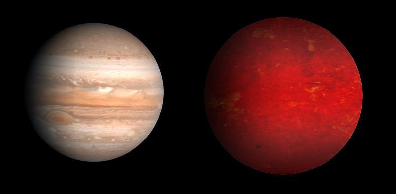 Comparación de tamaños entre el exoplaneta WASP-5b y Júpiter. El color de WASP-5b es supuesto. Sirve para cualquier exoplaneta con un radio = 1.13 veces el de Júpiter. Exoplanet WASP-5b and Jupiter's relative sizes. rexplnt=1.13rJ